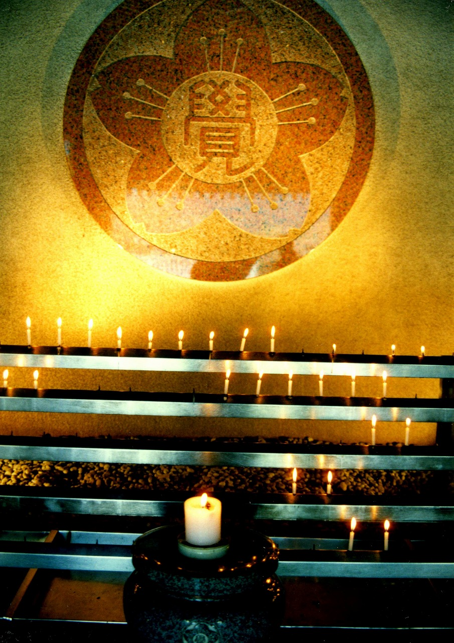 円応教祭壇